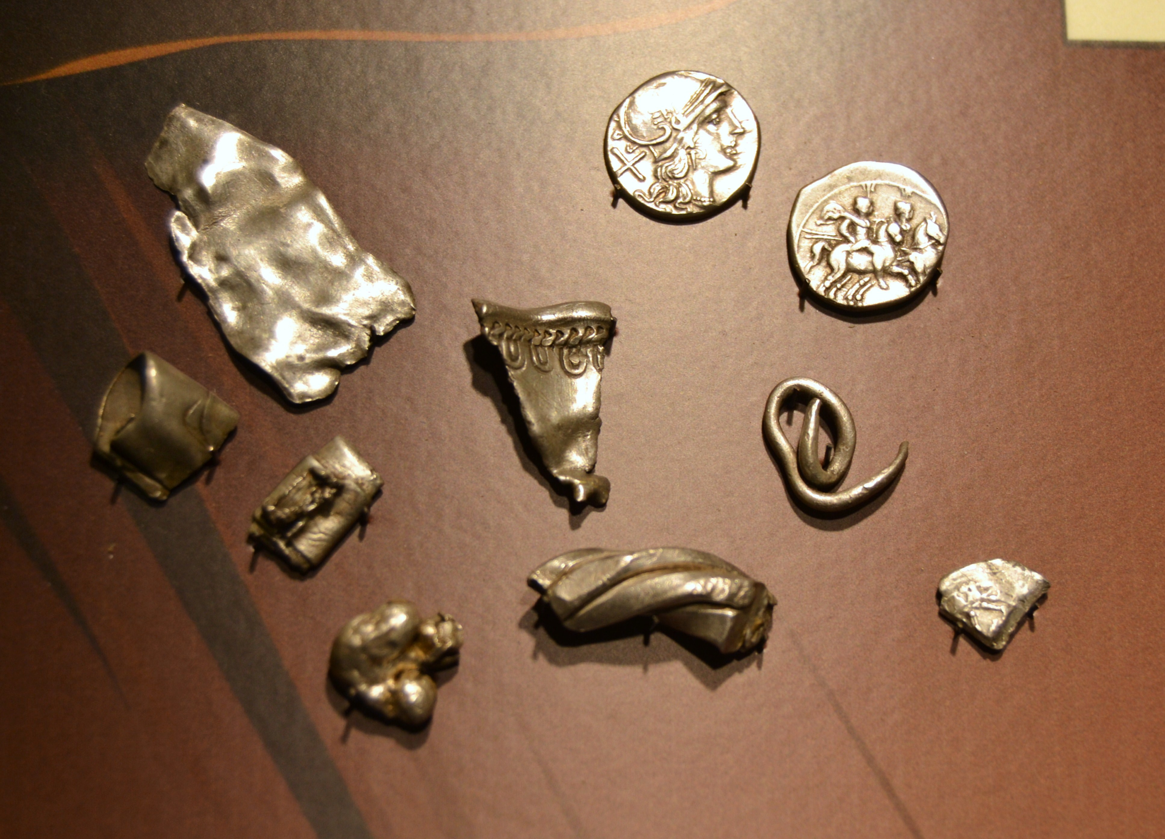 Tresor de Jalance, perdut cap al 170 aC. Fotografiat a una exposició del Museu de Prehistòria de València.